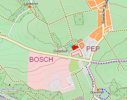 Übersichtskarte zum Mittelshof bei Eisenach.